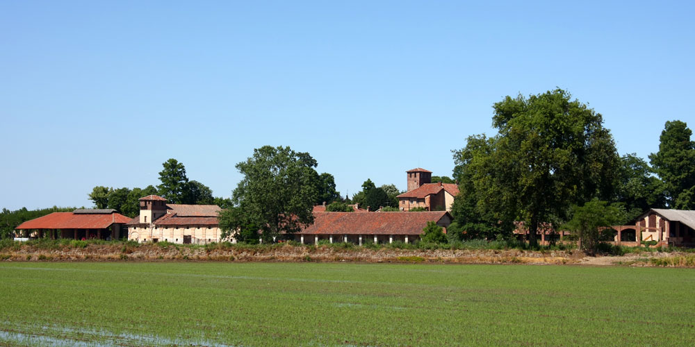 Veduta di Olevano (PV) con il castello